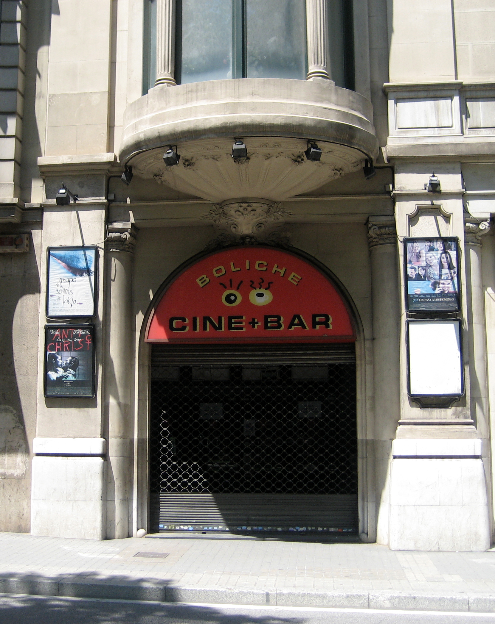 Entrada del Cinema Boliche de Barcelona (maig, 2010)